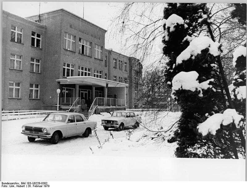 Berlin, Robert-Rössle-Klinik ADN-Zentralbild Link 28.2.79-Berlin-Buch: Blick auf den Haupteingang des Zentralinstitute für Krebsforschung der Akademie der Wissenschaften der DDR und des Robert-Rössle-Instituts.